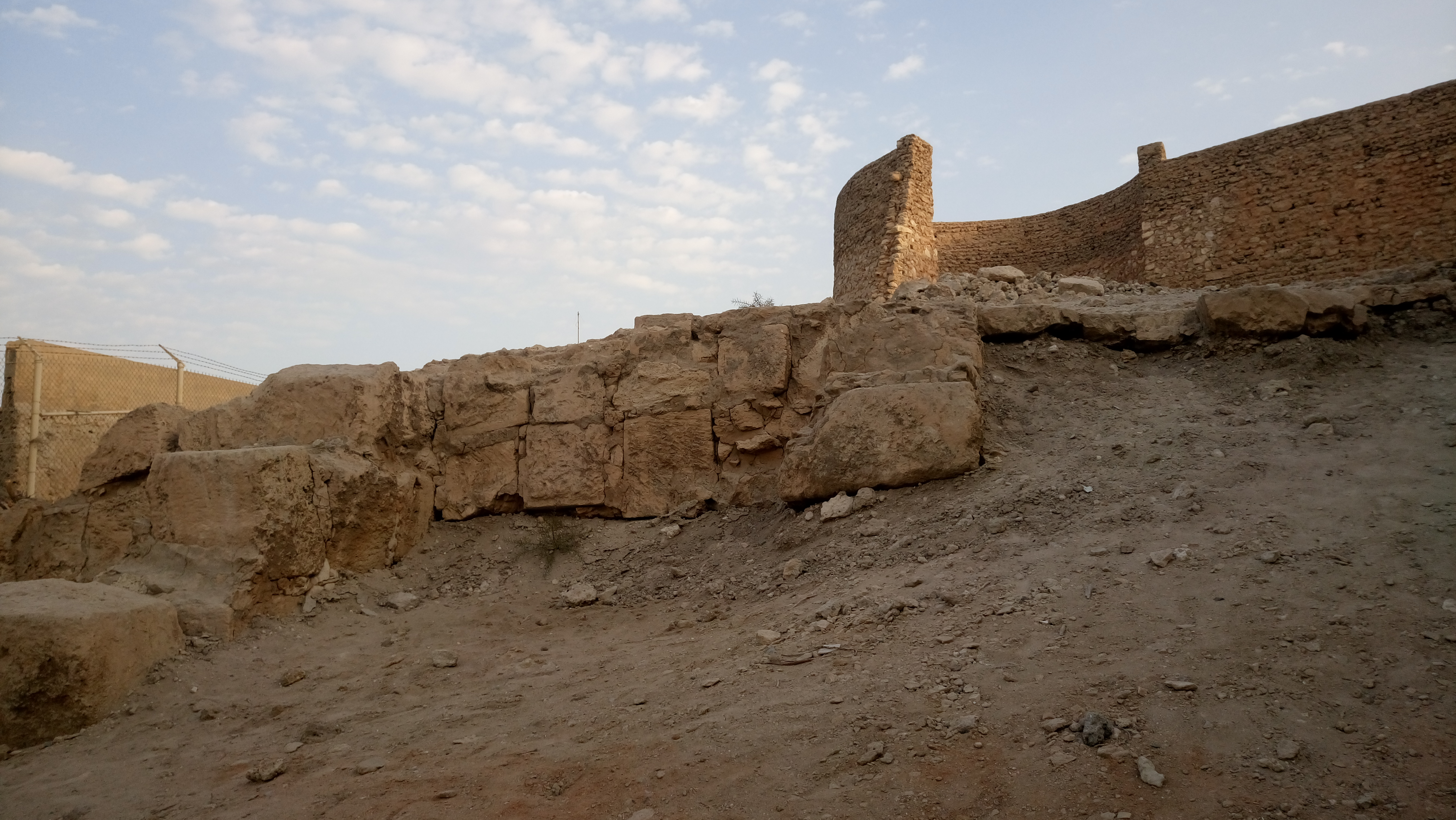 توضح الصورة أحجار المعبد الأساسية التي قامت عليها قلعة تاروت.